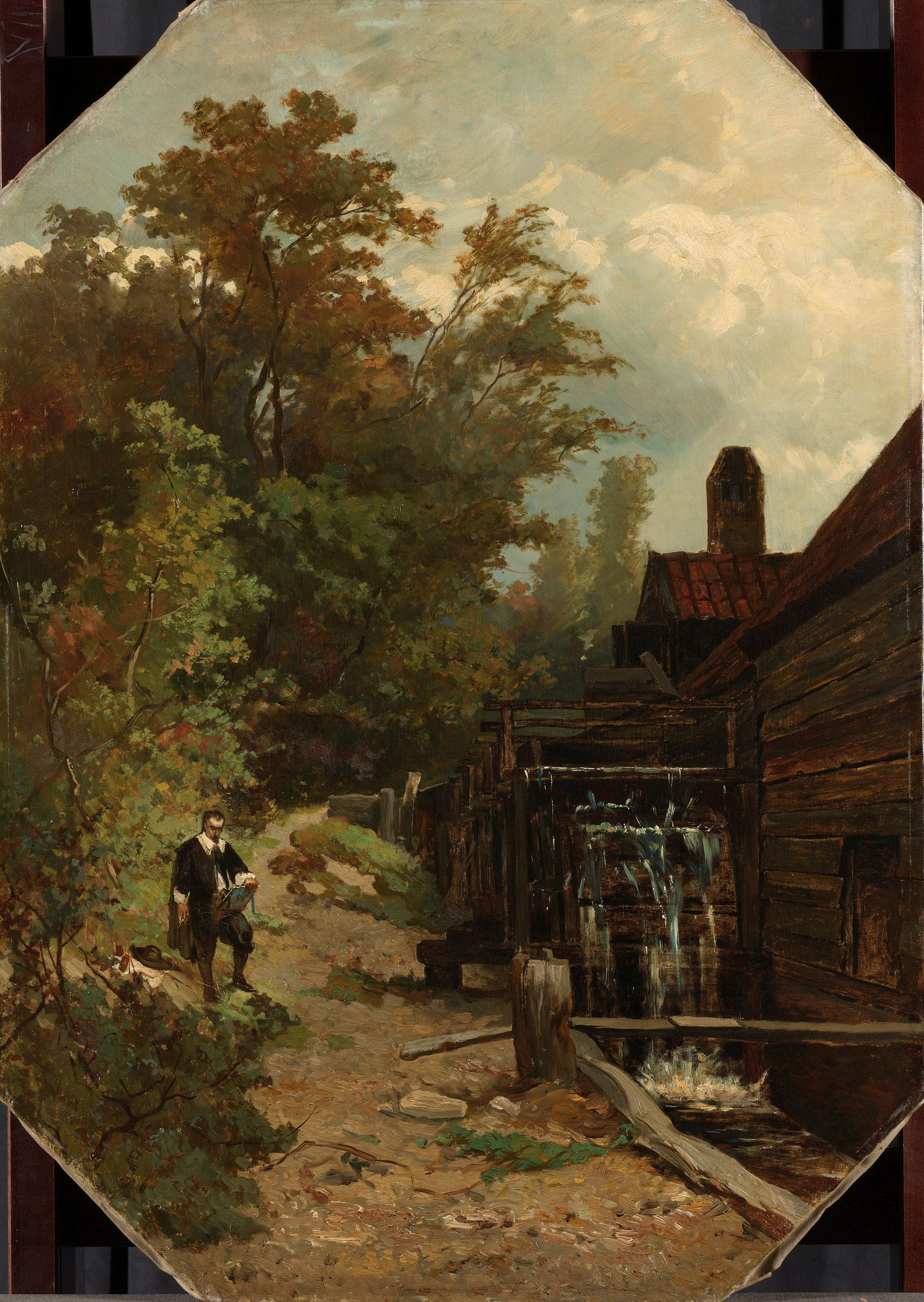 Jacob van Ruisdael een watermolen schetsend. Rechts de watermolen met draaiend rad. Links staat de kunstenaar te tekenen. Het schilderij maakt deel uit van de reeks 'De Historische Galerij van Arti et Amicitiae'.; Albert Gerard Bilders (1838–1865), olieverf op doek, 1864